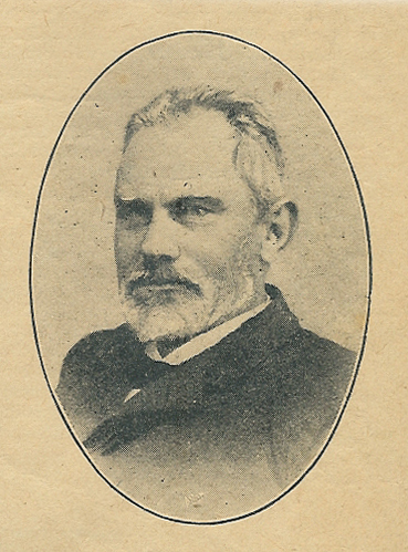 Borgmester i København Adolph Jacobi, 1914. Også kaldet "Fattigborgmesteren" pga hans omsorg for de fattige.